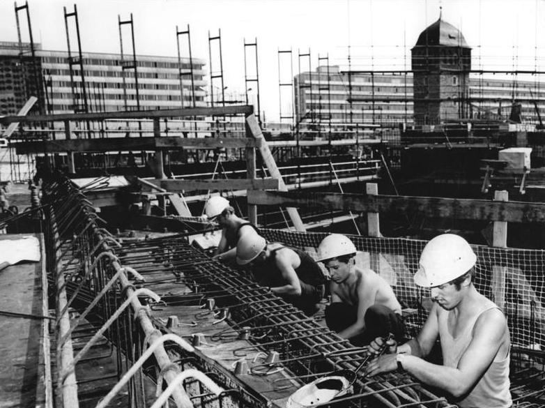 Karl-Marx-Stadt, Bau "Große Stadthalle", Bauarbeiter Zentralbild Thieme 24.7.70 Karl-Marx-Stadt: Stadtzentrum Karl-Marx-Stadt-Die Bauarbeiter der Baustelle "Grose Stadthalle" im Karl-Marx-Städter Stadtzentrum geben vor den Vertrauensleuten Rechenschaft über die Erfüllung des Planes entsprechend dem Zyklogramm. Das bedeutet für die Bauarbeiter, Reserven für ein schnelleres Bautempo zu erschliesen und die entstandenen Planrückstände aufzuholen. Von den Aktiven, denen jeweils fünf bis sieben Bauarbeiter angehören, wurden Anregungen für die Beseitigung der Stillstandzeiten an den Maschinen und für konsequente Einhaltung der Arbeitszeit gegeben. Betonbauer Dietmar Tanneberger, Josef Uhas, Roland Merbeth und Bernd Keller (vlnr) gehören zu den Schrittmachern der Betonbauerbrigade Schmäschke.